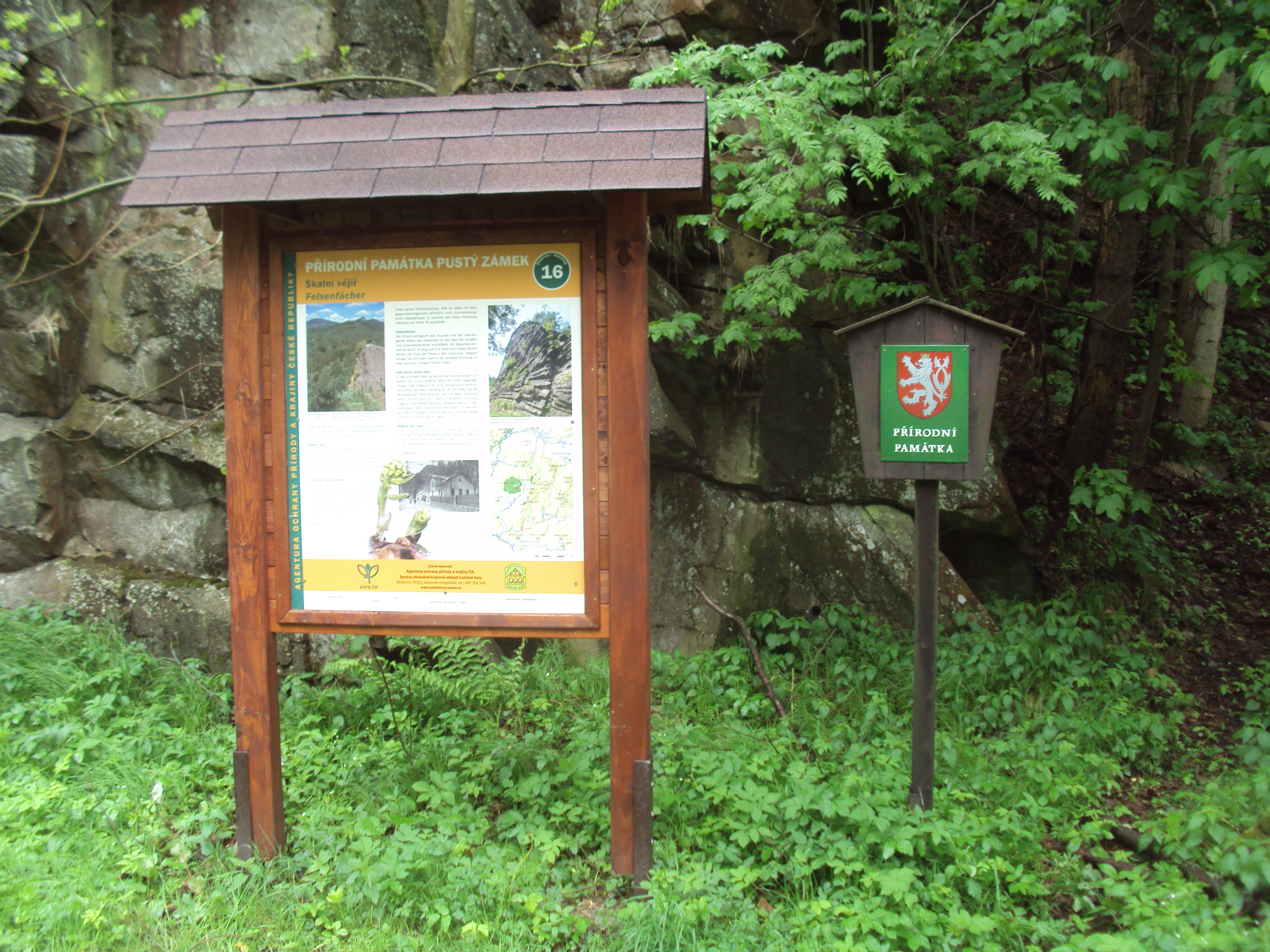 Tabule na úpatí PP Pustý zámek, součást Naučné stezky okolo Studence